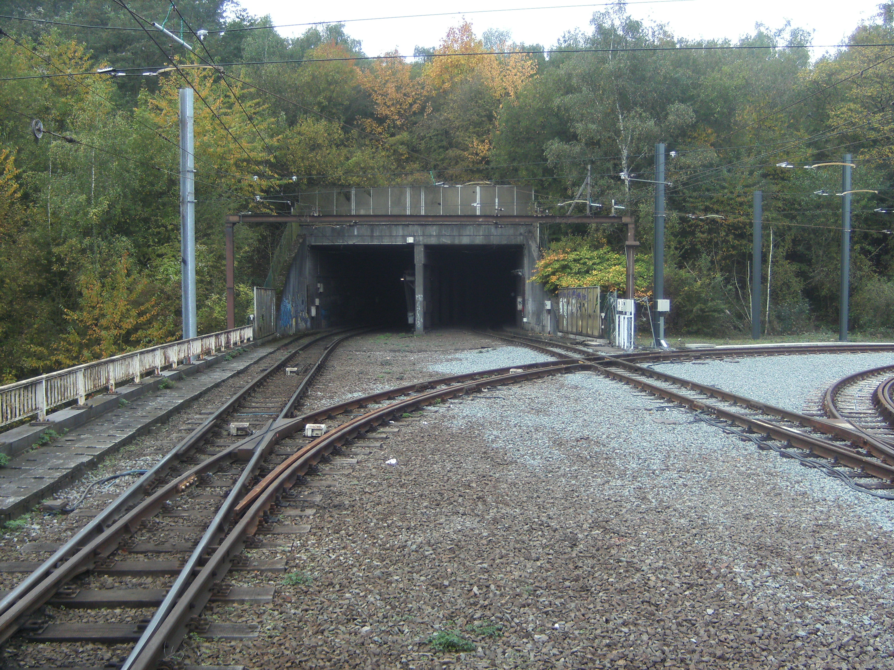 Métro léger de Charleroi - station Piges - tunnel sous le terrils des Piges